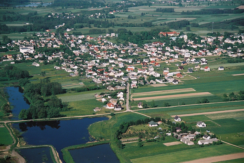 Zdjęcie lotnicze miejscowości Siennica (powiat miński)